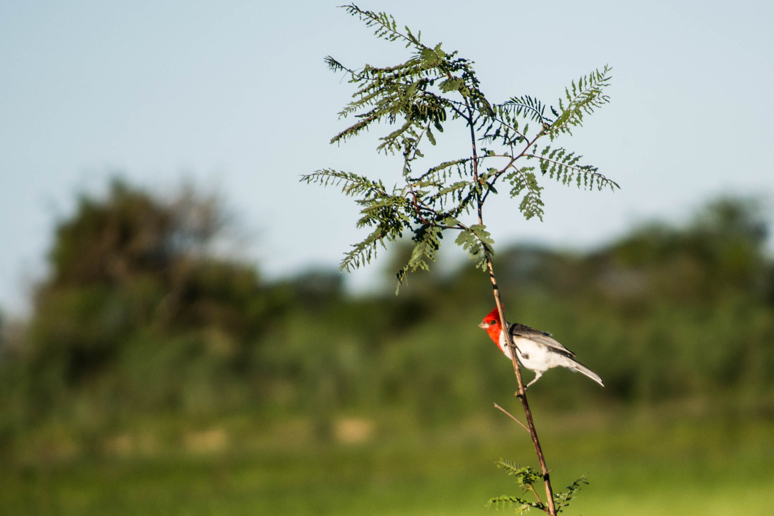 Cardenal posado en árbol -2